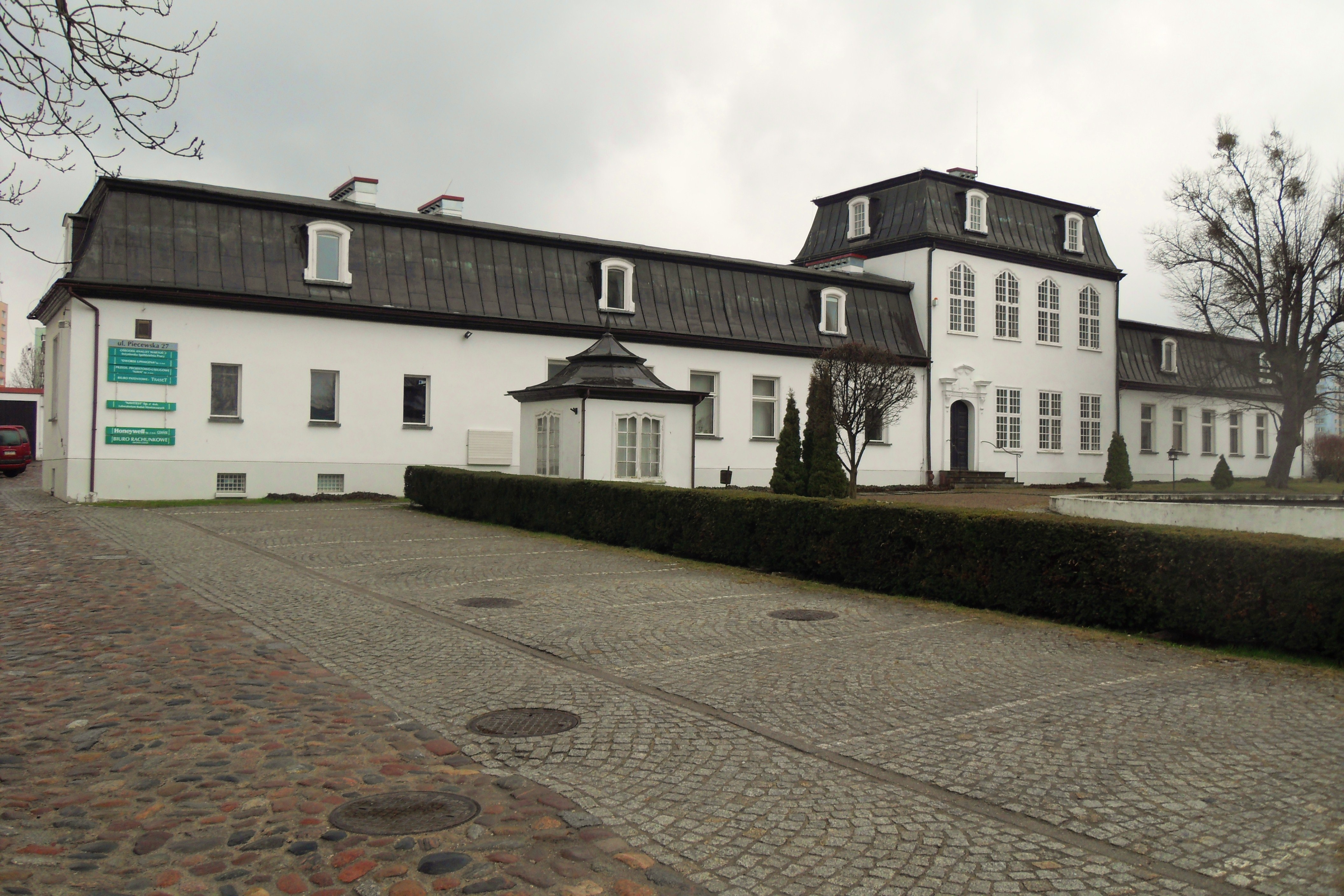 Gdańsk Piecki, ul. Piecewska 27. Zespół dworski Uphagenów (zabytek nr rejestr. 1015)